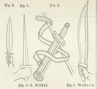 Grafik bronzezeitlicher Schwerter.